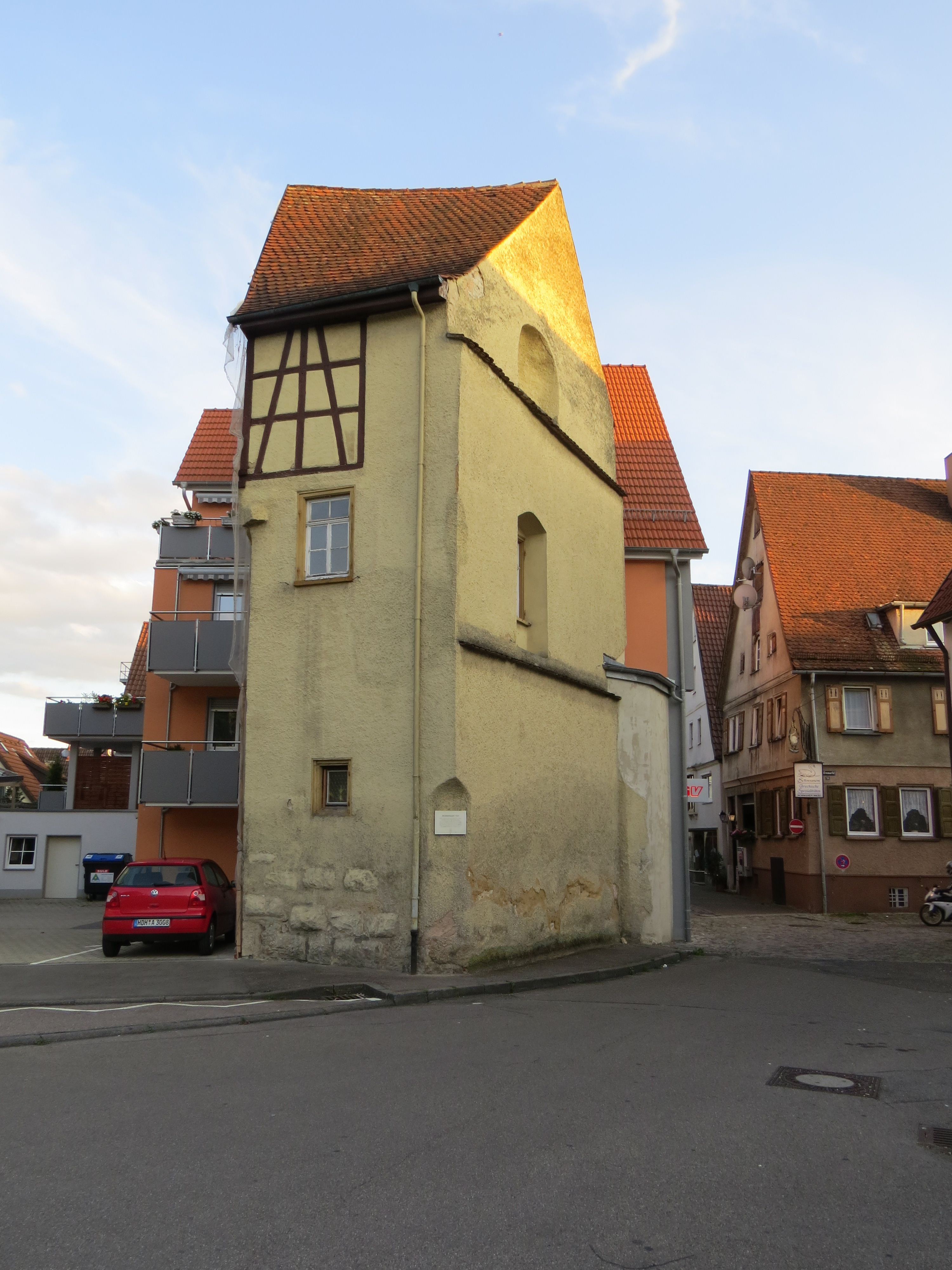 Memminger Torstr. 18 in Giengen an der Brenz